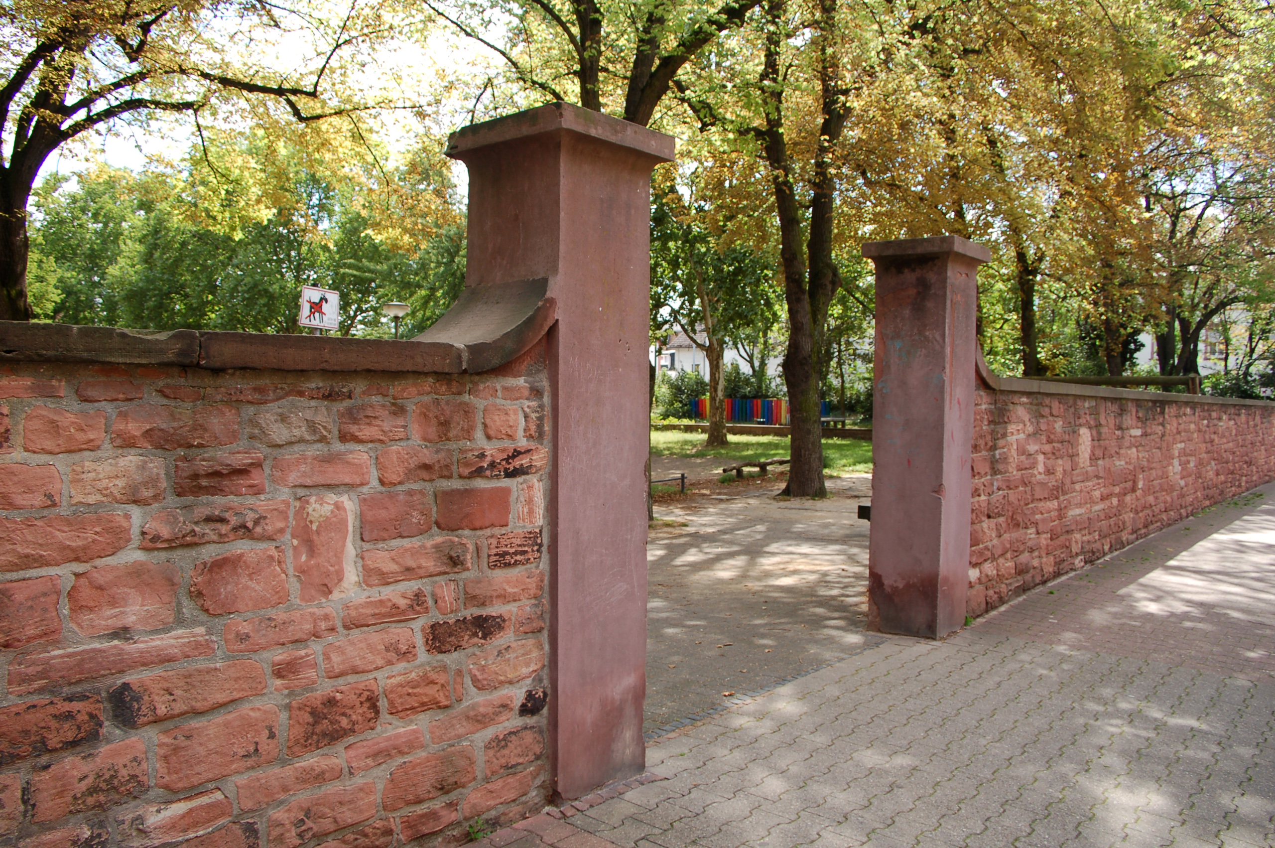 Umfassungsmauer des ehemaligen Luciusfriedhofs in Frankfurt Höchst